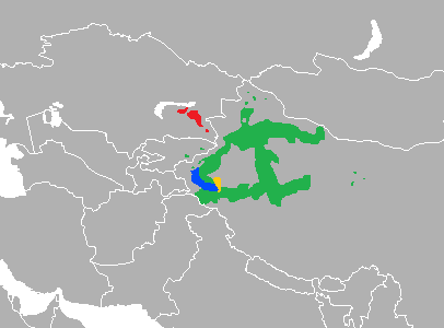 Lenguas uighúricas orientales, de la rama de las lenguas túrquicas surorientales, de la familia altaica. Idioma uigur Idioma lop Idioma aini Idioma ili turki